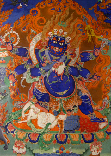 Pintura mural del Gompa de Likir, a Ladakh (Jammu i Caixmir, Índia)